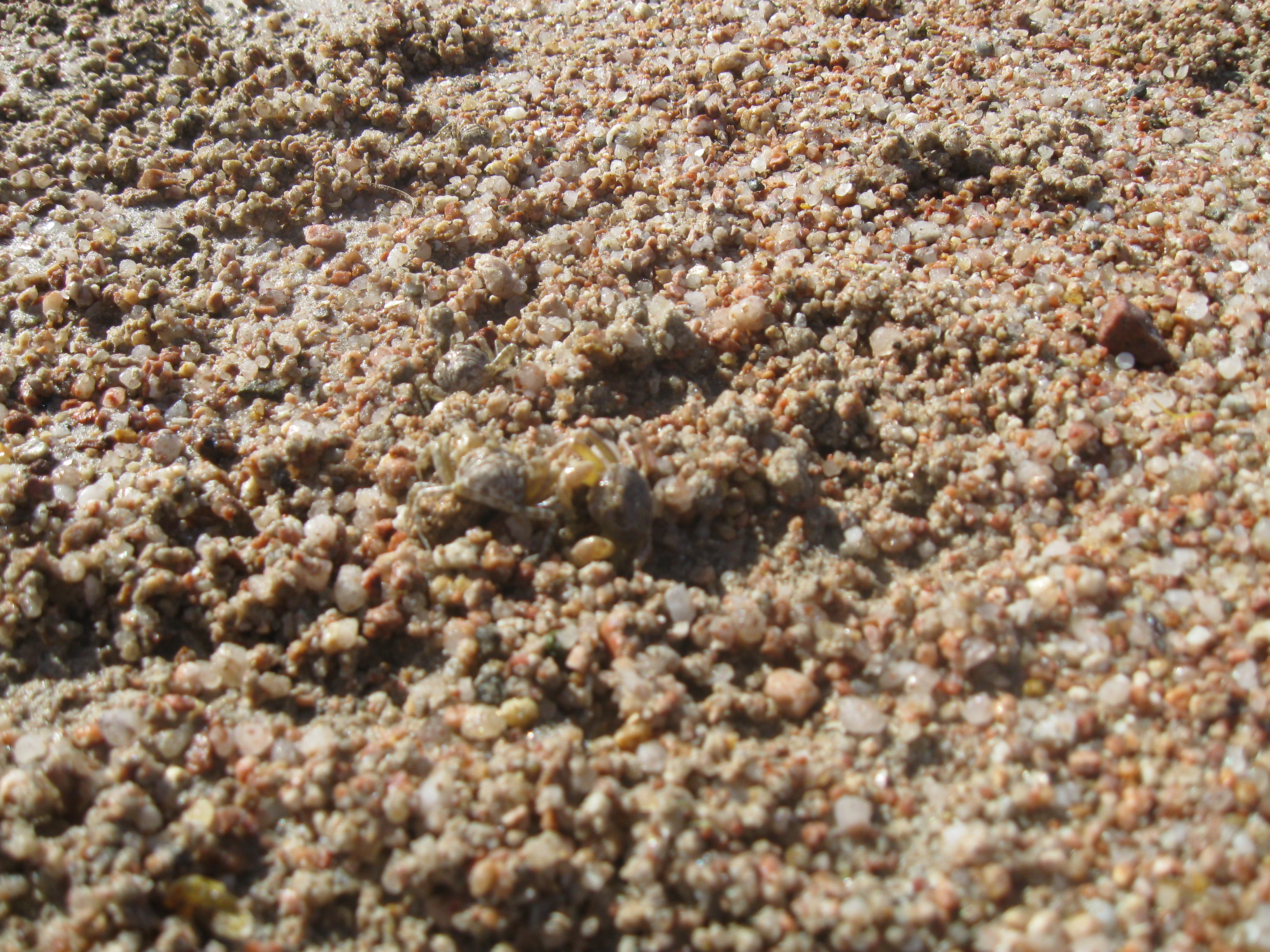 na plaży w piasku mieszkały setki malutkich krabików.Podczas spacerów po plaży chowały się one do swoich norek